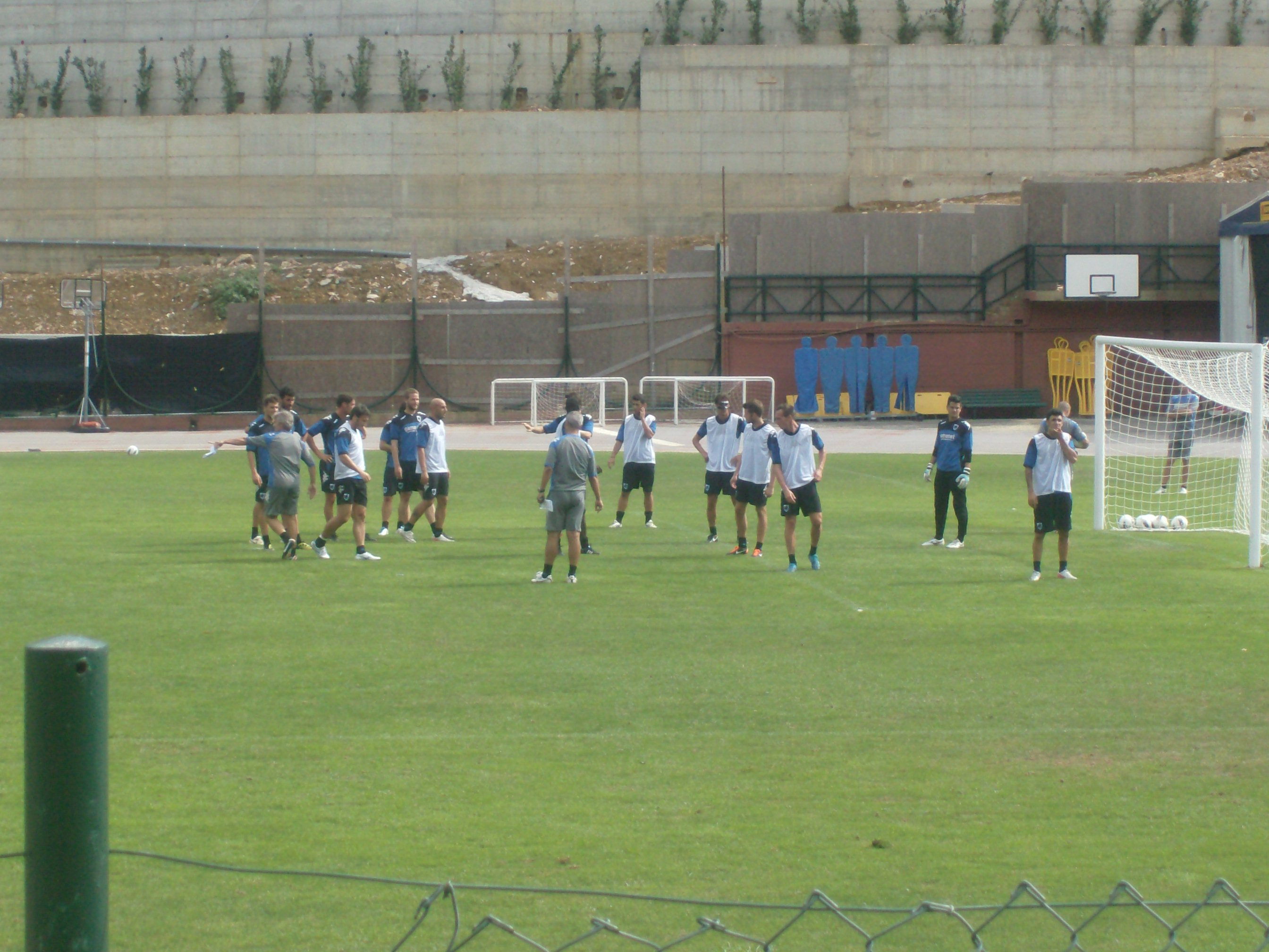 All. Atzori